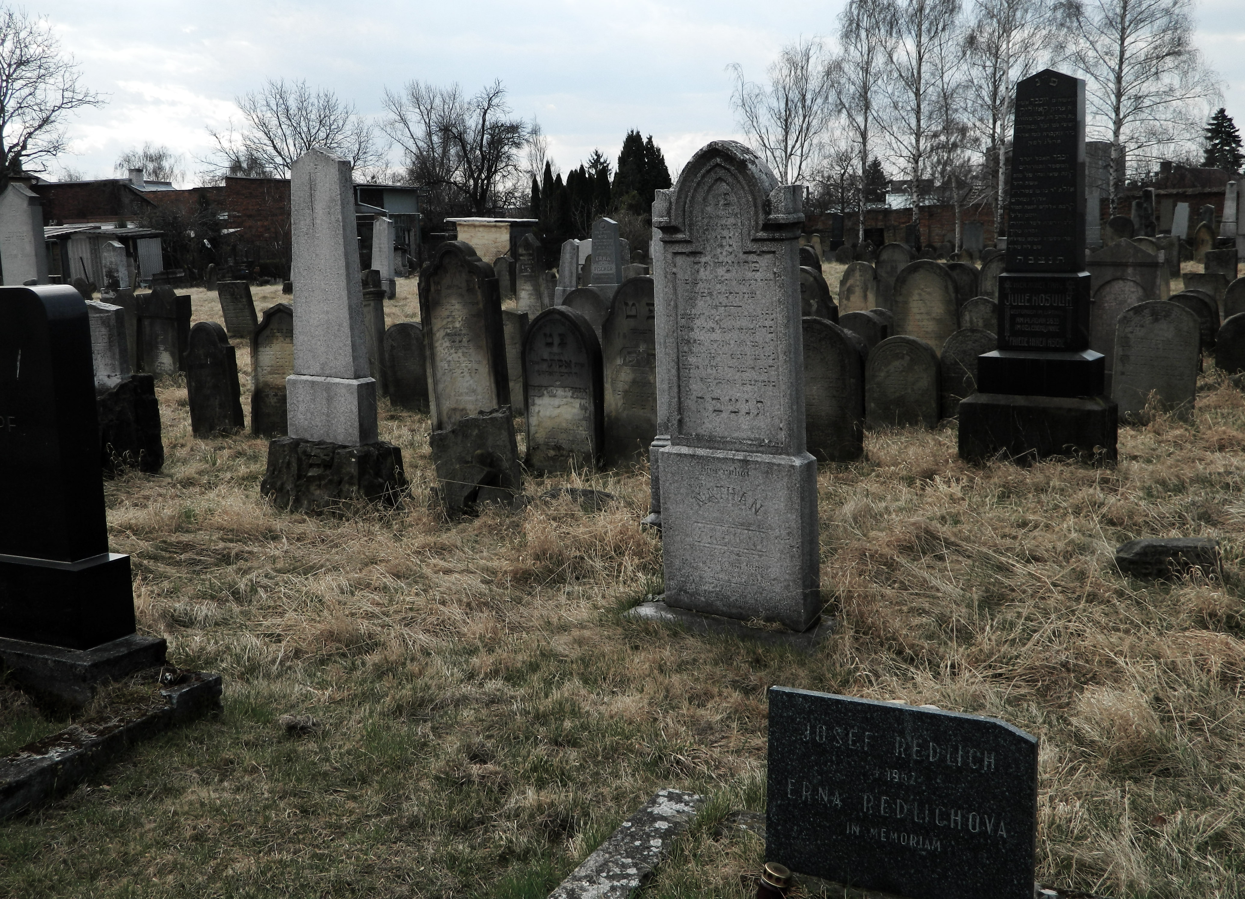 Židovský hřbitov (Holešov), Hankeho, Holešov